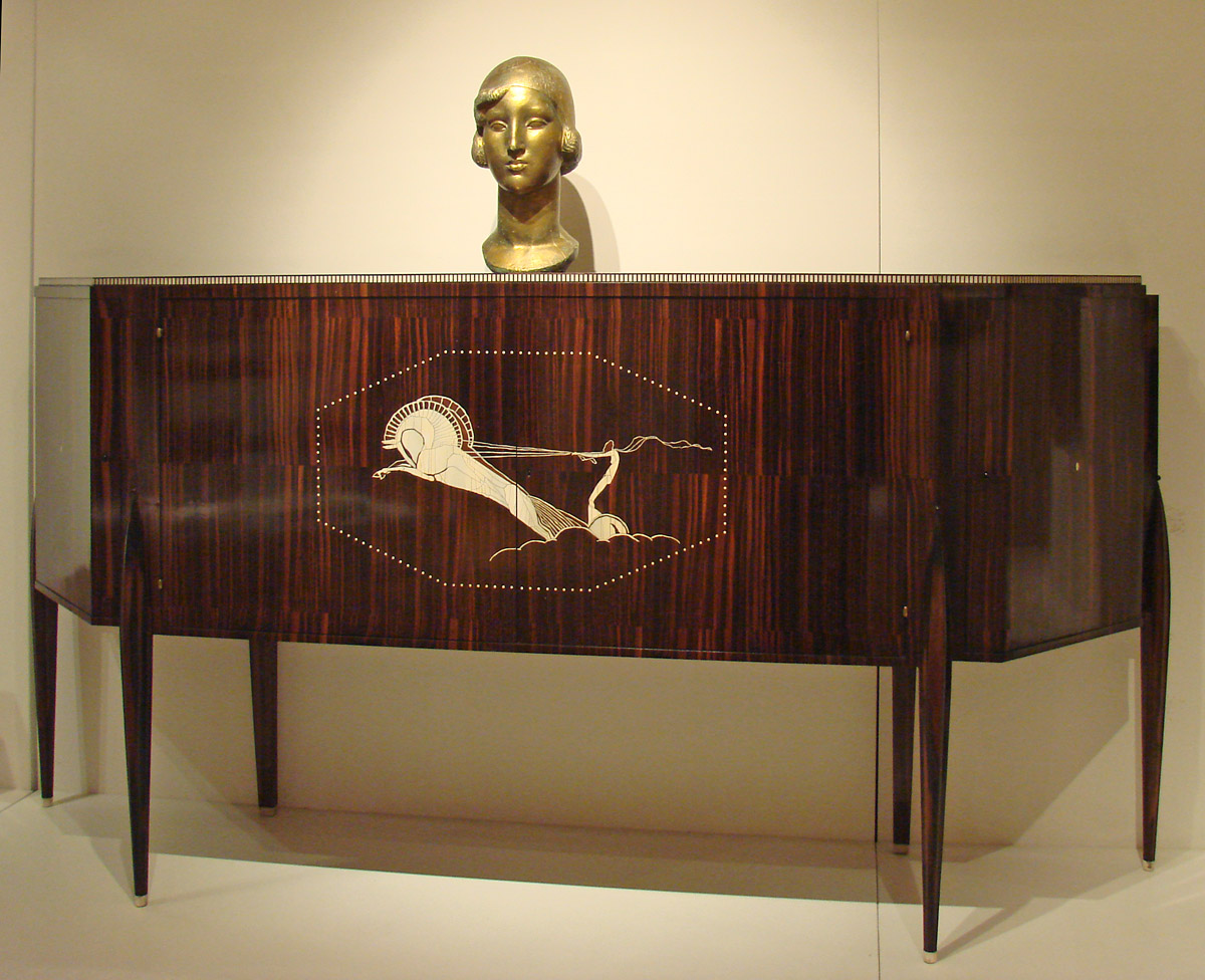 Meuble au char 1922 de Jacques-Emile Ruhlmann (1879-1933) Ebène de Macassar, amarante, ivoire Dépôt du musée du Louvre La salle du 3ème étage du musée des années 30 à Boulogne-Billancourt